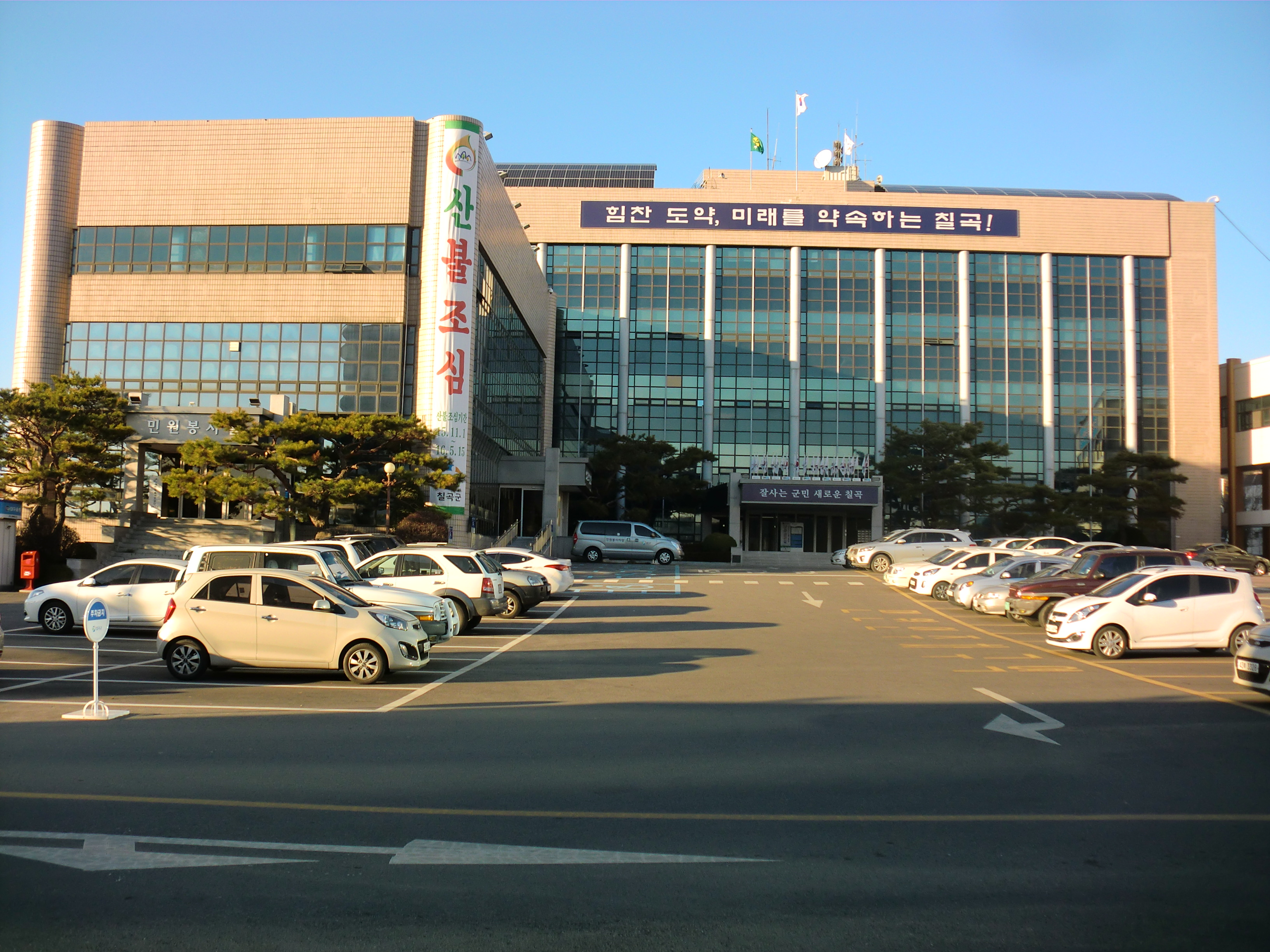 경상북도 칠곡군에 있는 칠곡군청